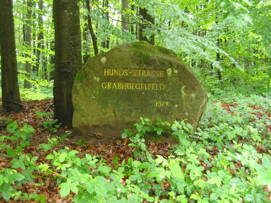 Ritterstein Nummer 244, Hunds - Strasse - Grabhuegelfeld